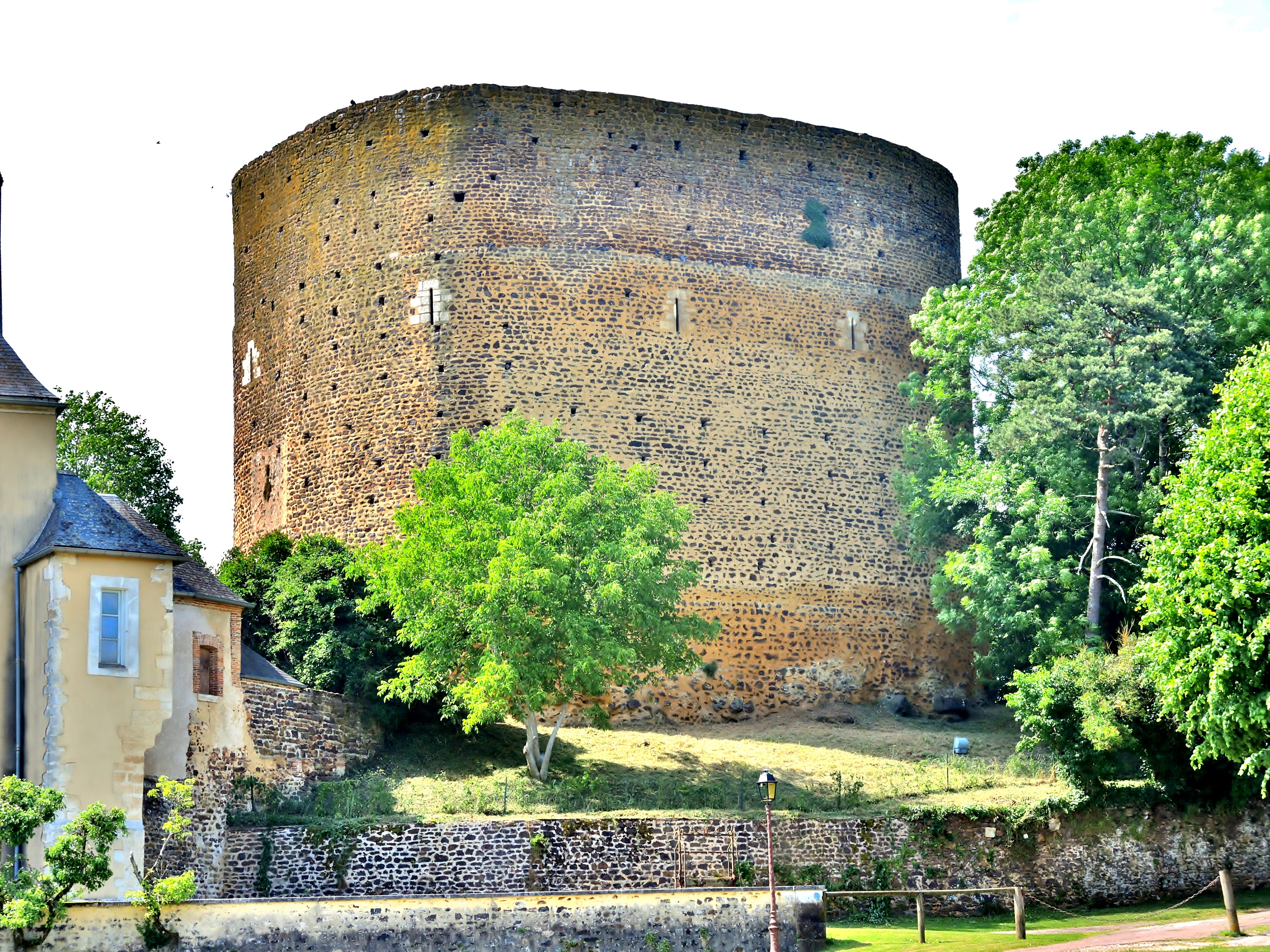 Tour Sarrazine ou donjon de Saint-Sauveur. Saint-Sauveur-en-Puisaye. Yonne